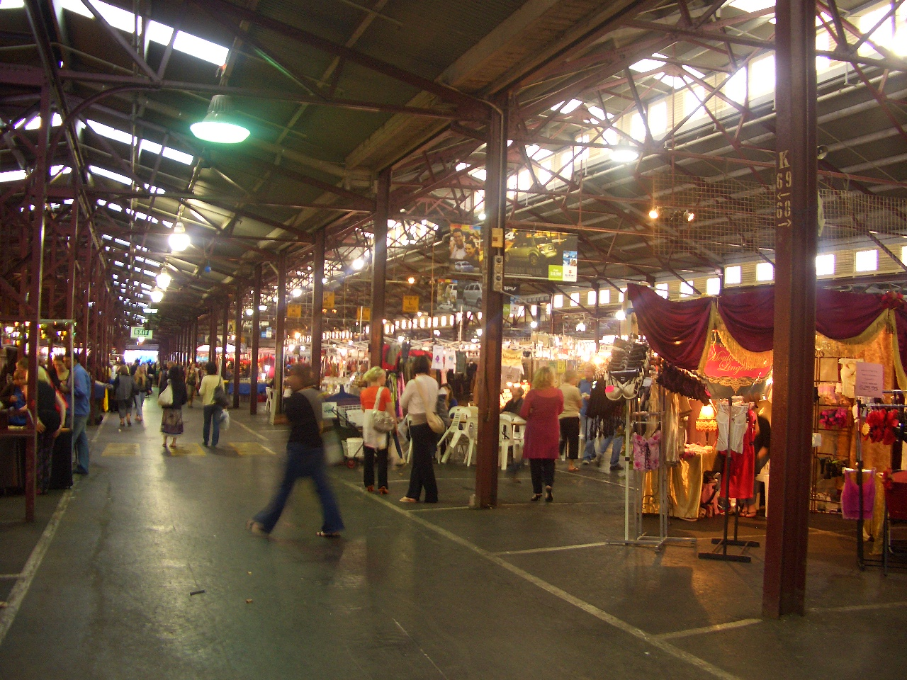 メルボルンのクイーンビクトリアマーケット